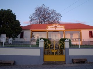 escola alexandre martha da cruz